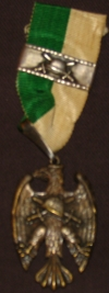 Erinnerungsabzeichen der Heimwehr an die Februarkämpfe 1934 (Österreichischer Bürgerkrieg)